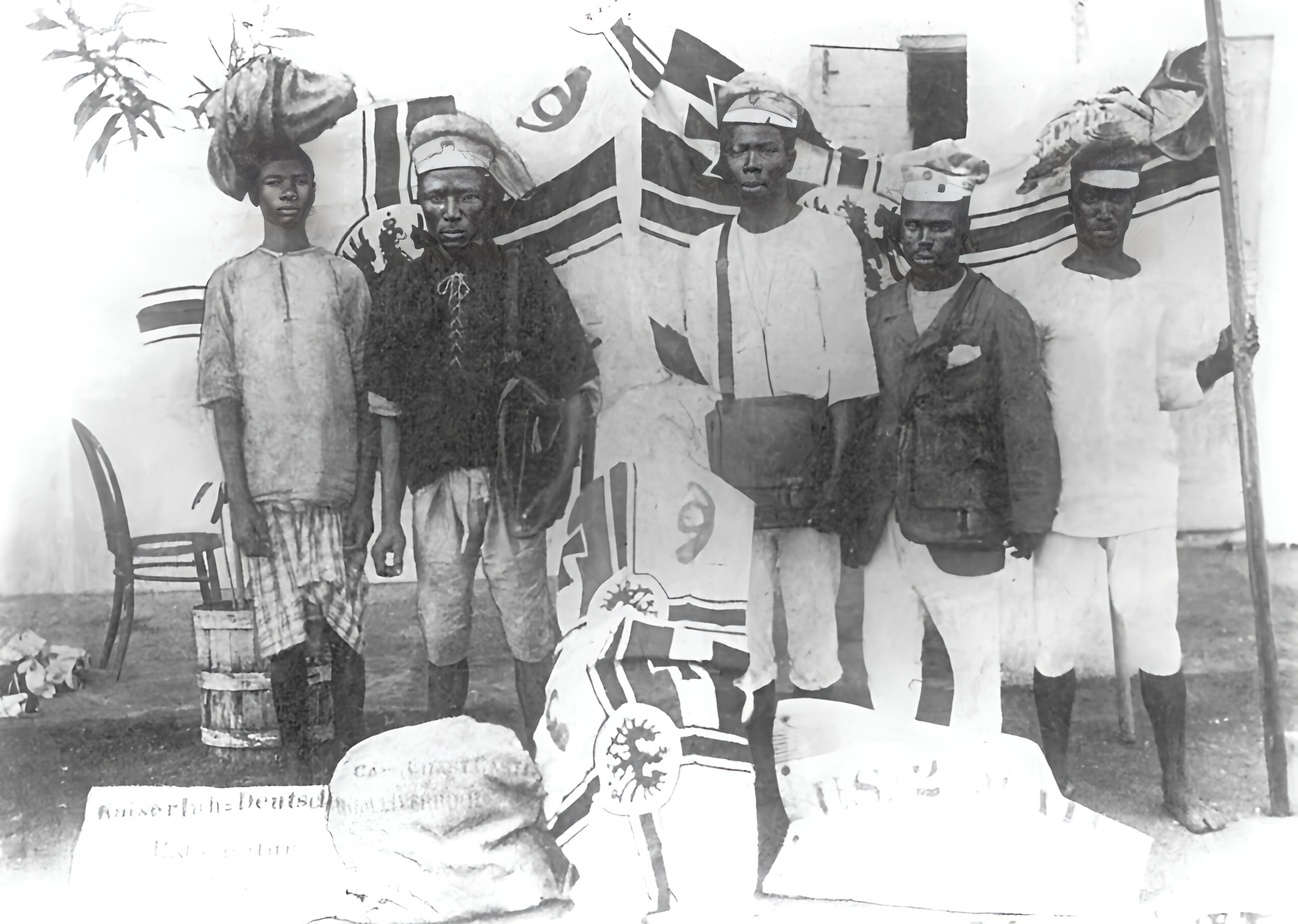 Afrikanische Angestellte der Kaiserlich-Deutschen Postagentur von Klein Popo/Togo mit Postflaggen, um 1890